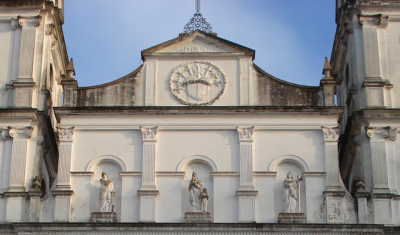 Detalhe da fachada da Igreja das Dores, Porto Alegre, Brasil, com esculturas de João Vicente Friedrichs